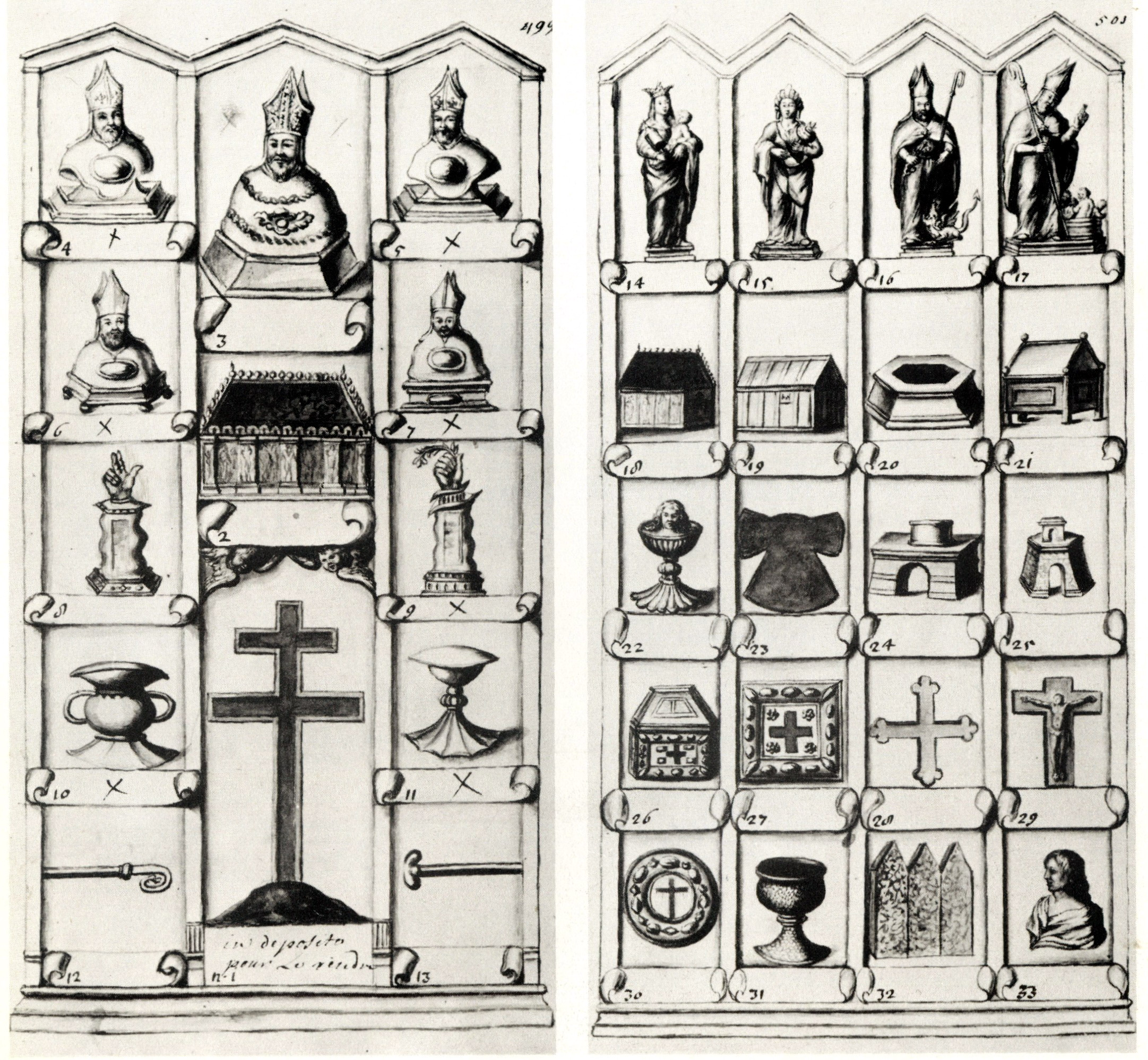 Toningsformulier St-Servaaskerk, Maastricht, met de belangrijkste kerkschatten (±1750).